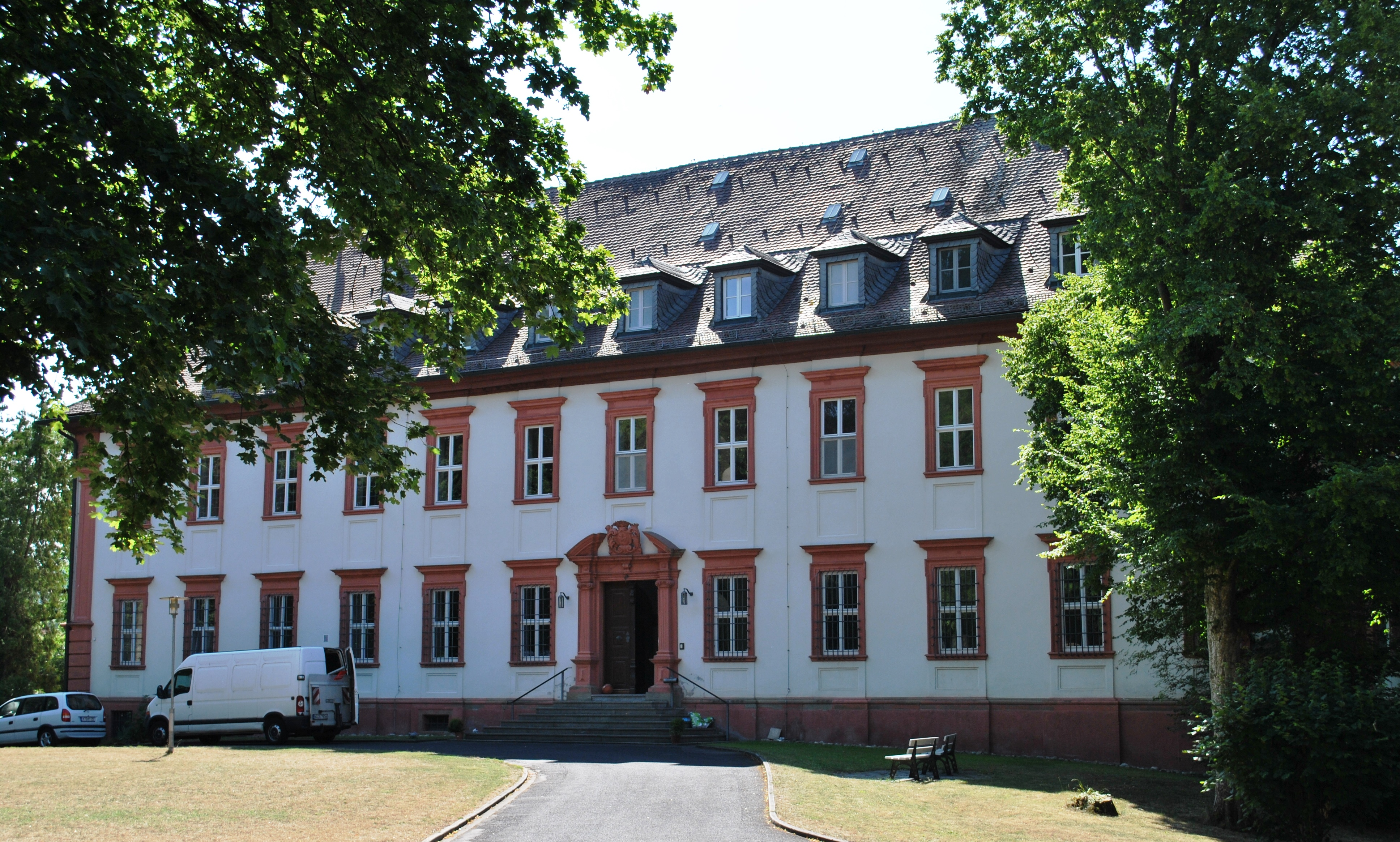 Schloss Kirchschönbach, Prichsenstadt, Schönbornschloss